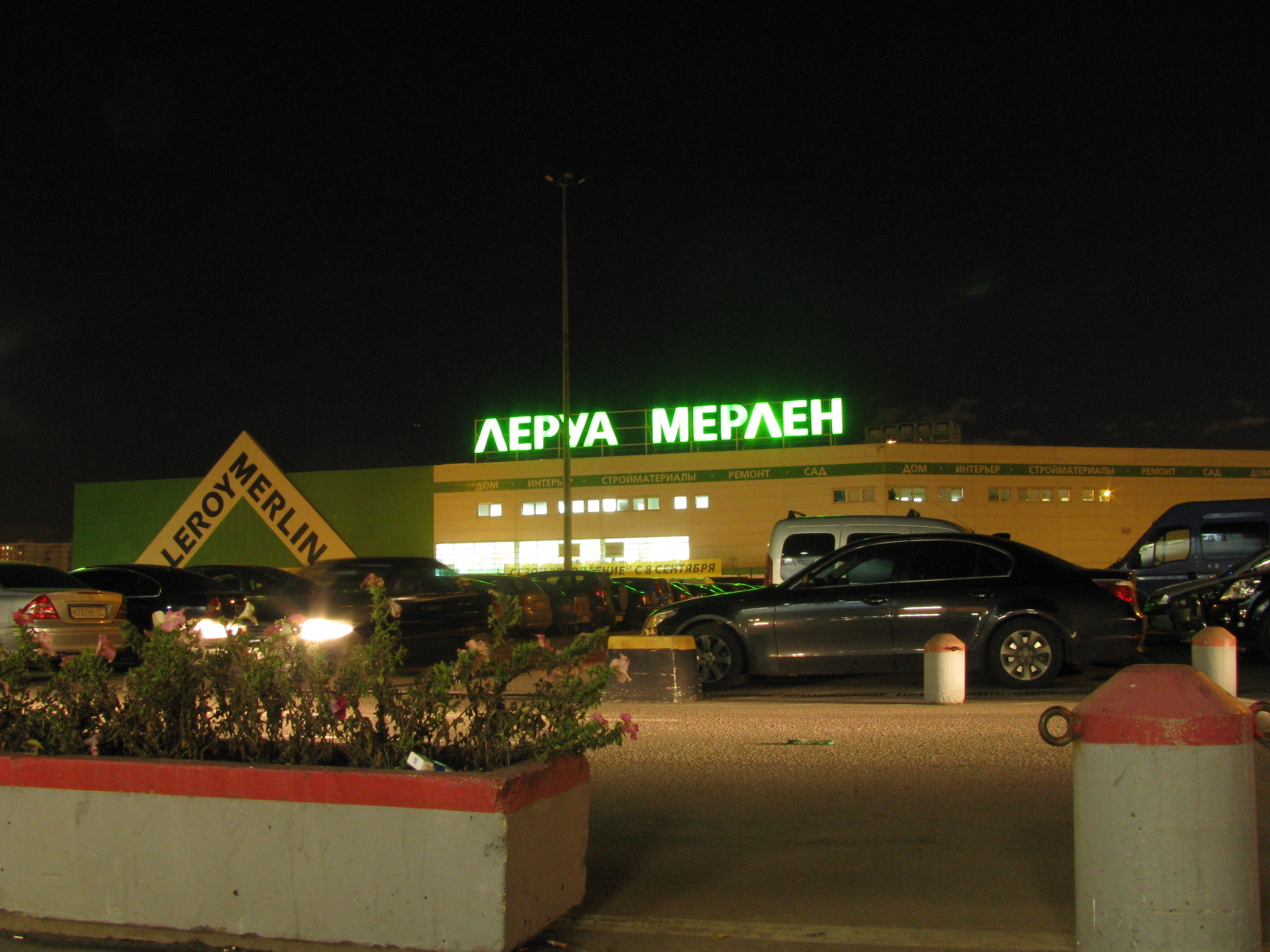 Магазин "Леруа Мерлен" в Мякинино ( г. Красногорск)